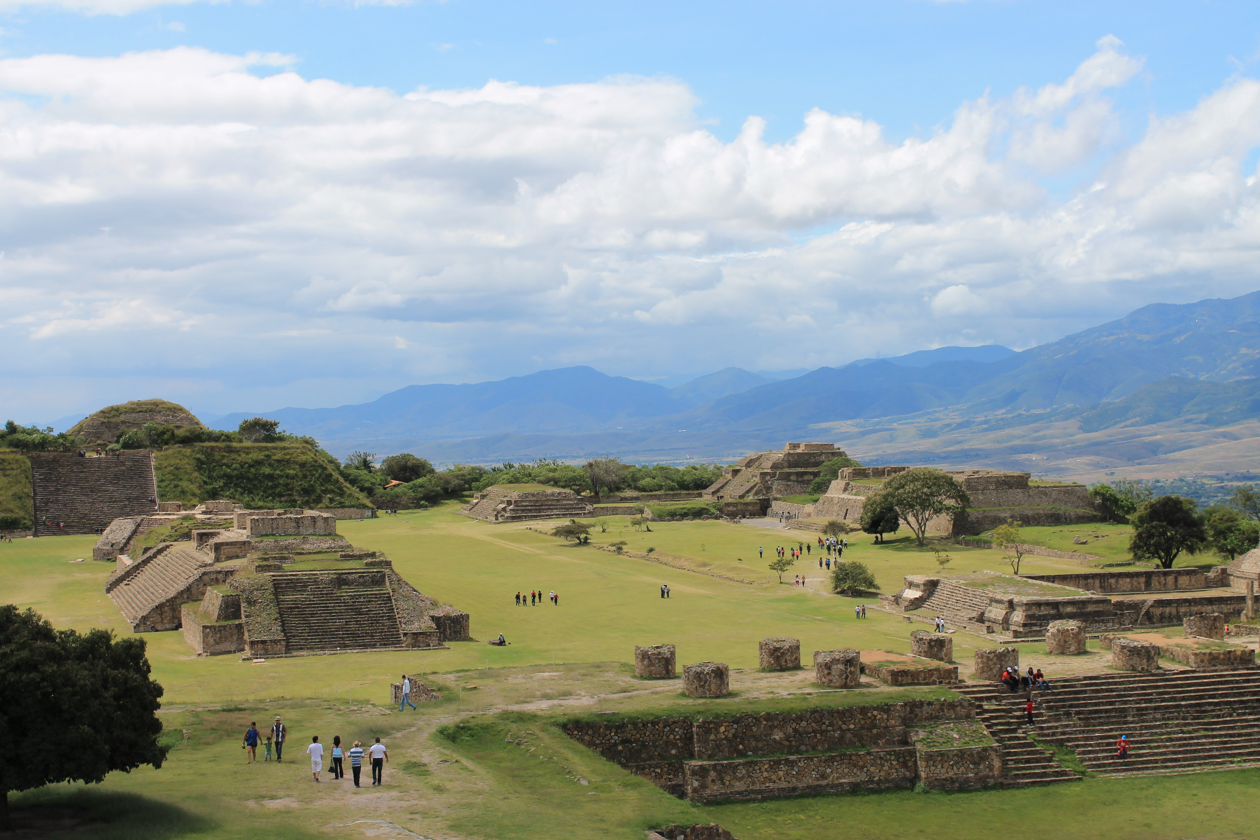 Panorámica que muestra una sección de la Plataforma Norte en primer plano, en el medio la Gran Plaza y al fondo la plataforma Sur. En primer plano se puede ver una sección del Patio Hundido de la Plataforma Norte. Al fondo a la izquierda se aprecia la Plataforma Sur y sobre ella el Edificio III. En la sección de la Gran Plaza, los edificios G,H,I y J. En seguida a la derecha está el Sistema M, frente al cual está la Galería de los Danzantes. Junto a la Galería de los Danzantes se aprecia el Edificio de los Danzantes o Edificio L. A la derecha se aprecia el Edificio K, también conocido como Sistema IV.